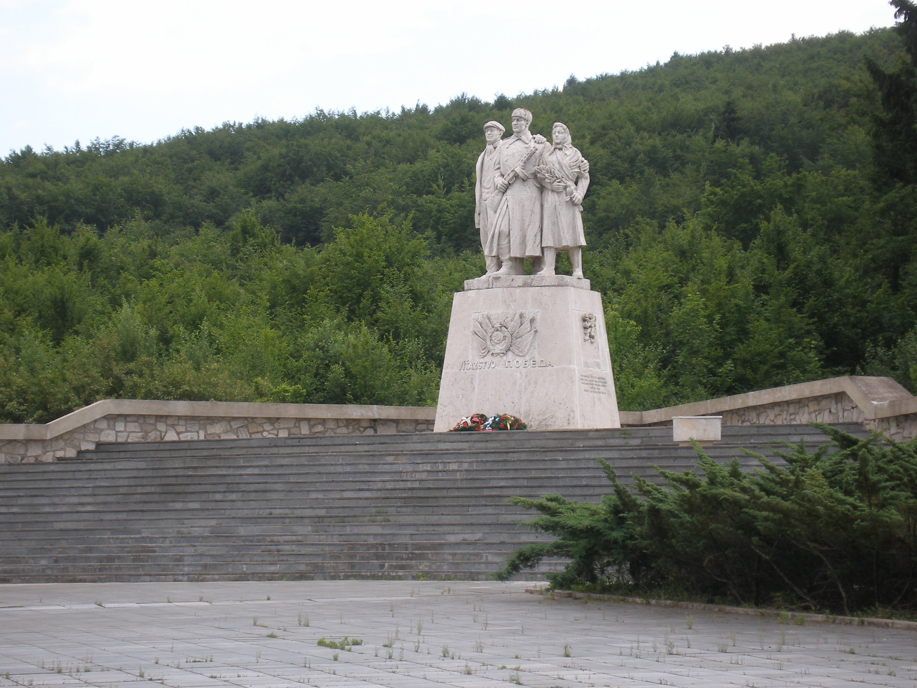 Vojenský pamätník obetiam Druhej svetovej vojny na Dargove,okr.Košice-okolie. Pomník víťazstva, travertín výška 400 cm. Autor Vojtech Löffler.